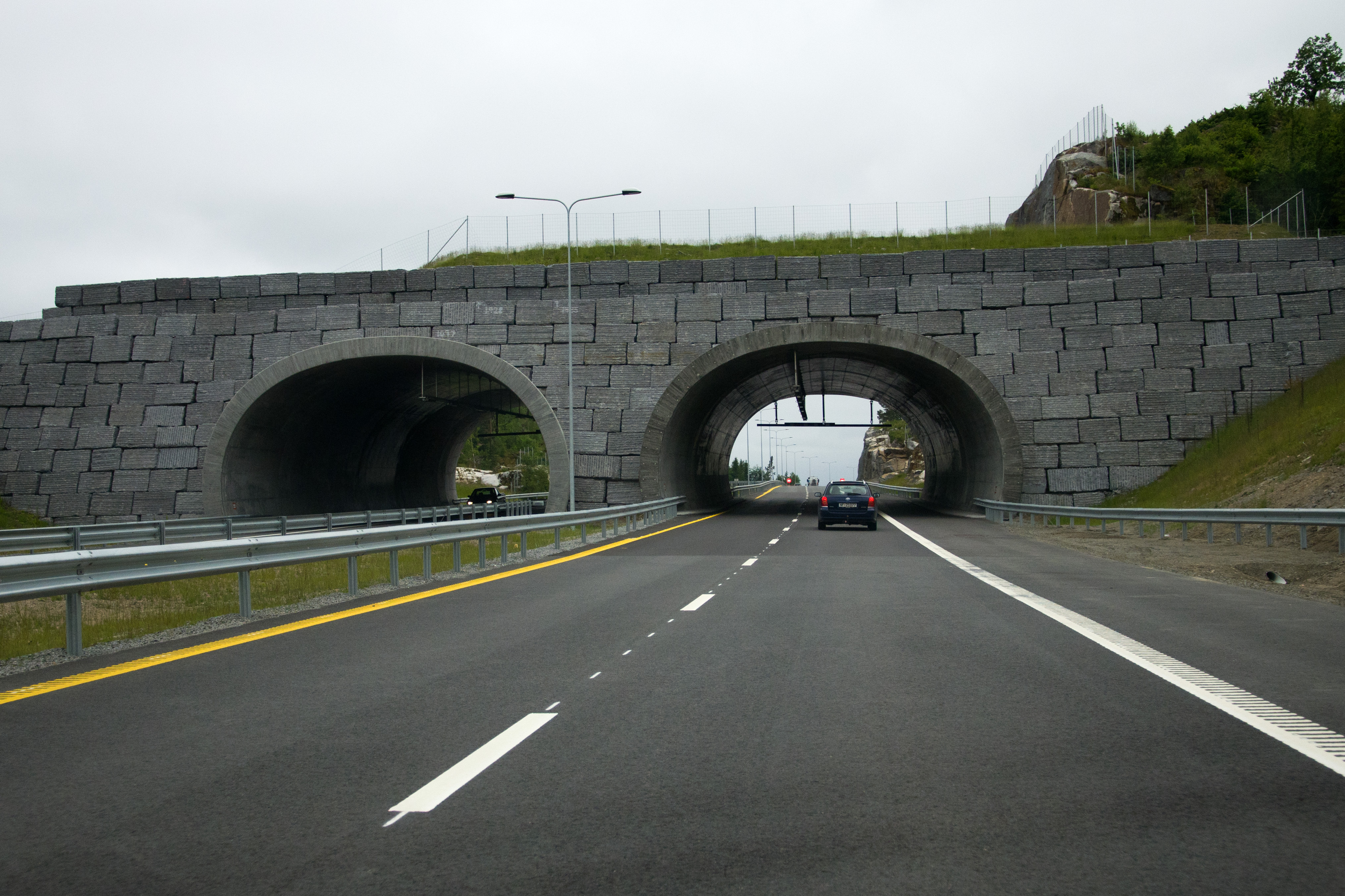 Solumtunnelen, E18 i Larvik, Vestfold. Sett fra øst.